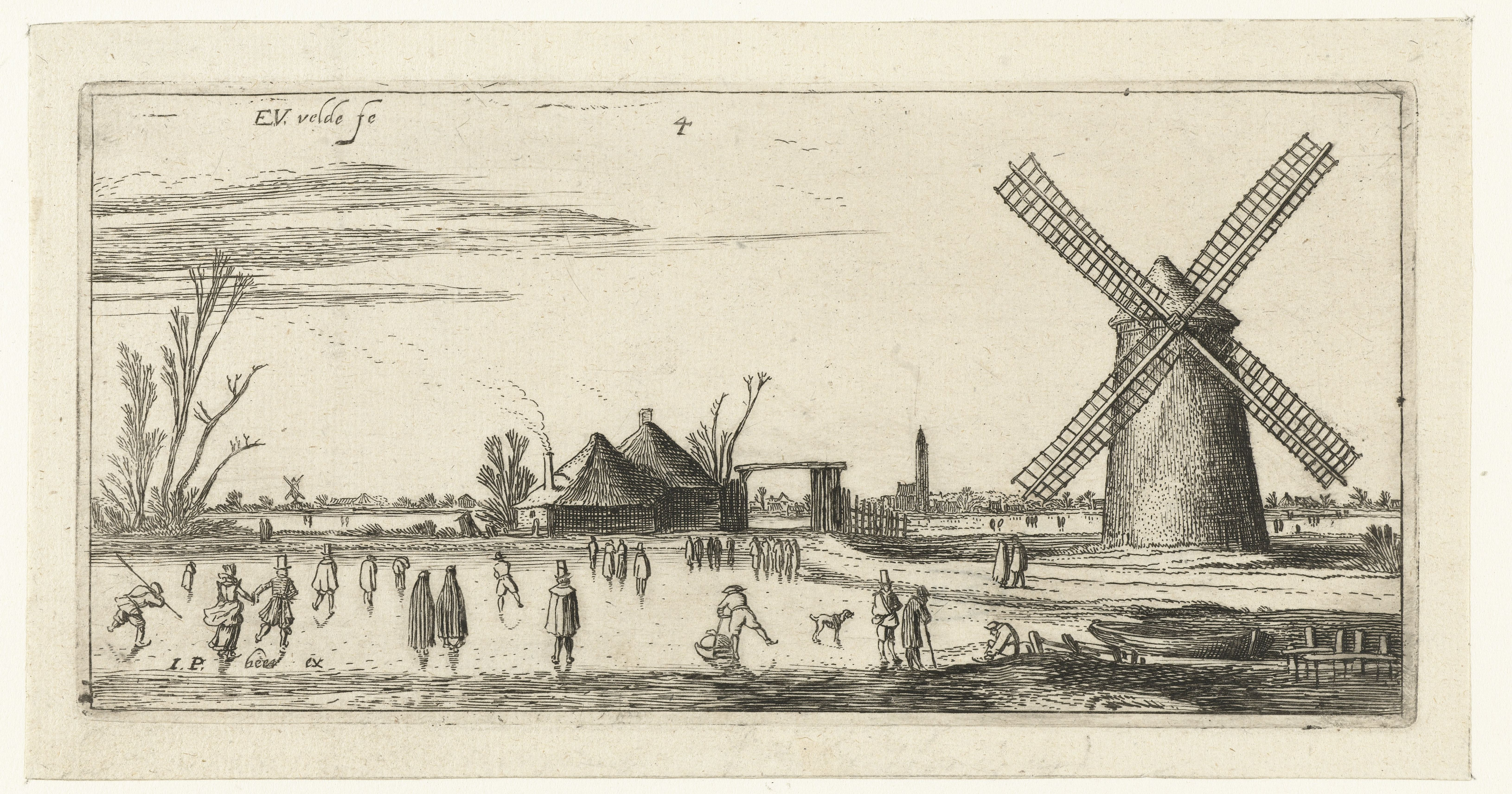 Schaatsers op het ijs bij een molen in de buurt van Penningsveer